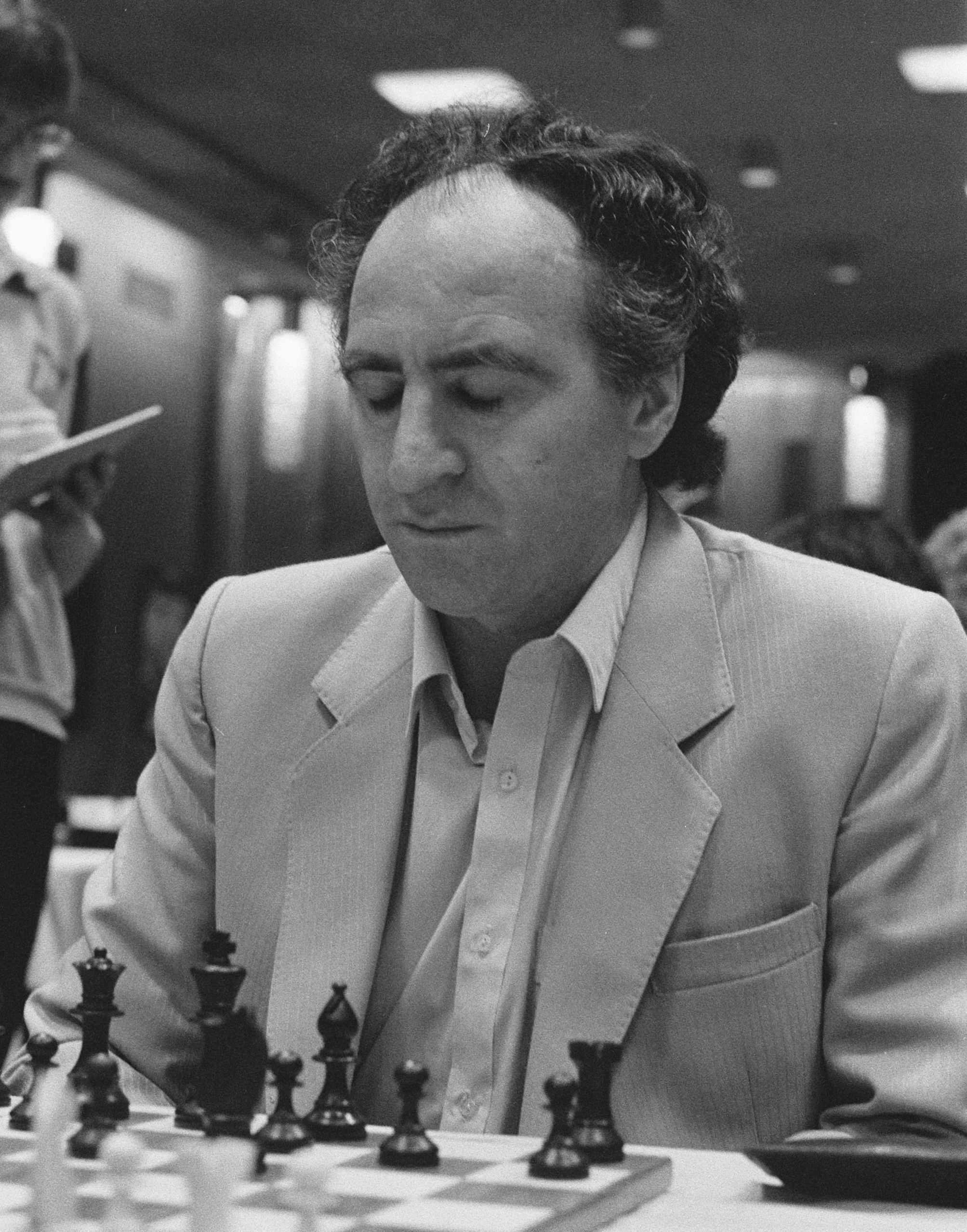 Lev Polugaevsky